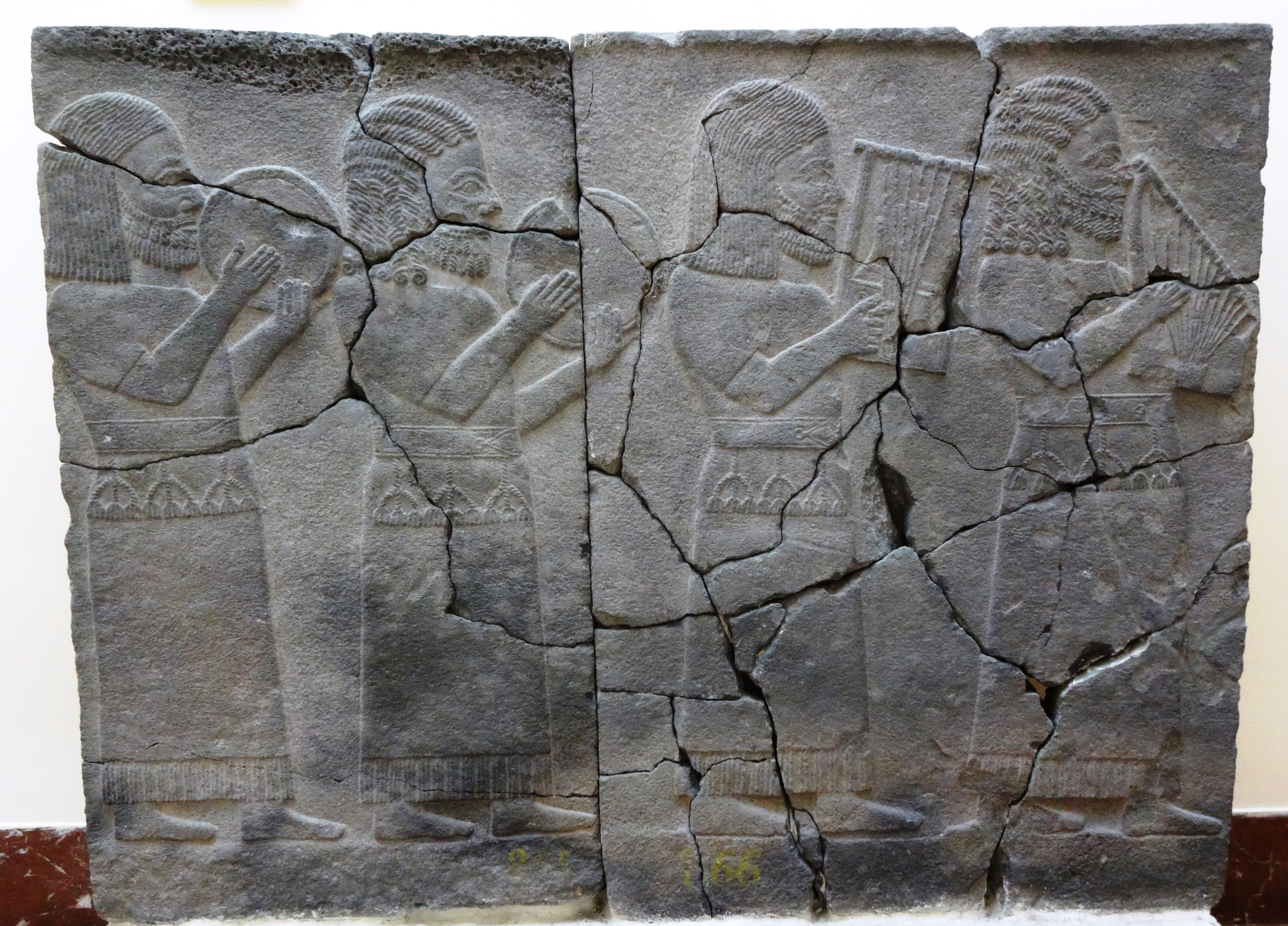 späthethitisches (aramäisiert) Basaltrelief mit Musikern, 8. Jh. v. Chr., Archäologisches Museum Istanbul, Inv. No. 7723